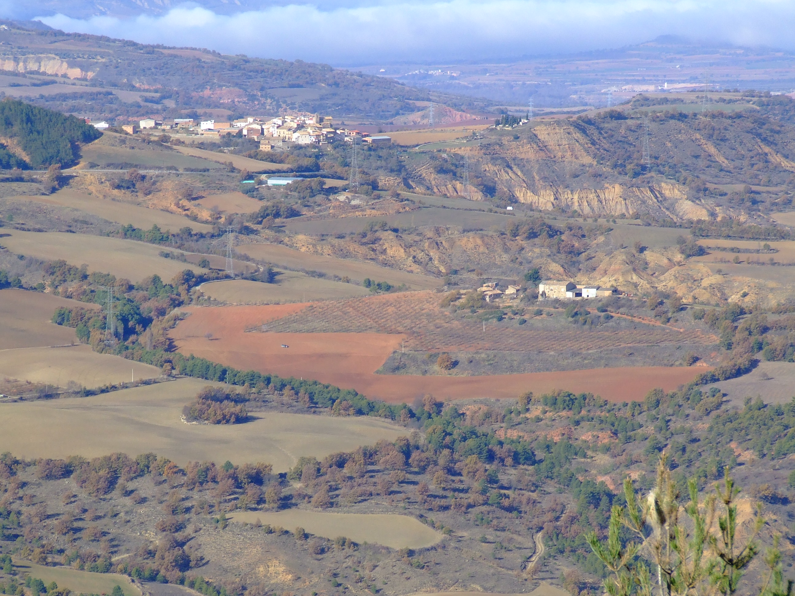 El poble de Sant Salvador de Toló (Gavet de la Conca) i el de Gramenet, a primer terme (Isona i Conca Dellà). Al mig, el riu de Conques (Pallars Jussà)